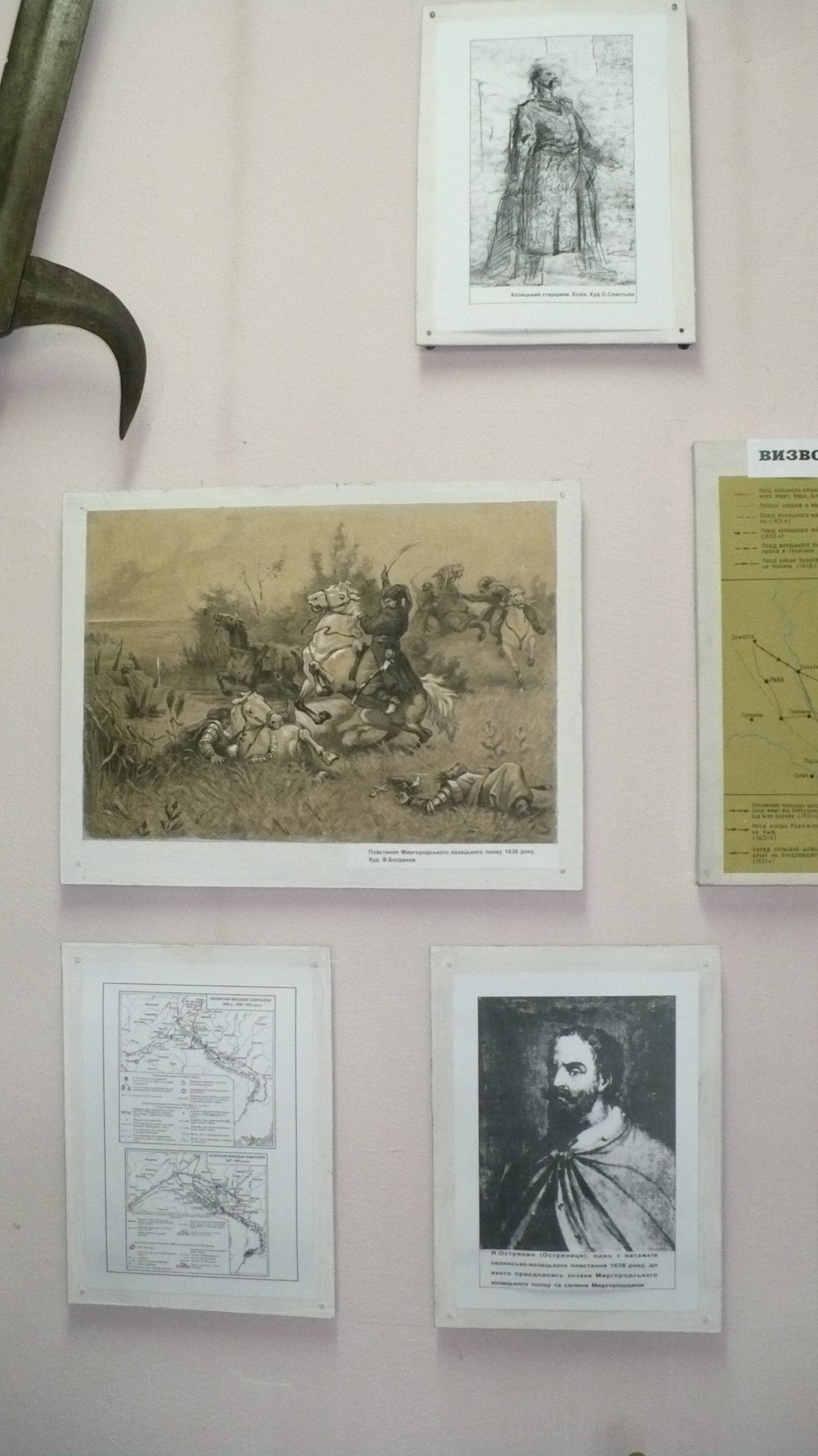 Миргородський Краєзнавчий музей (усередині 23). Внутрішній вигляд Миргородського Краєзнавчого музею